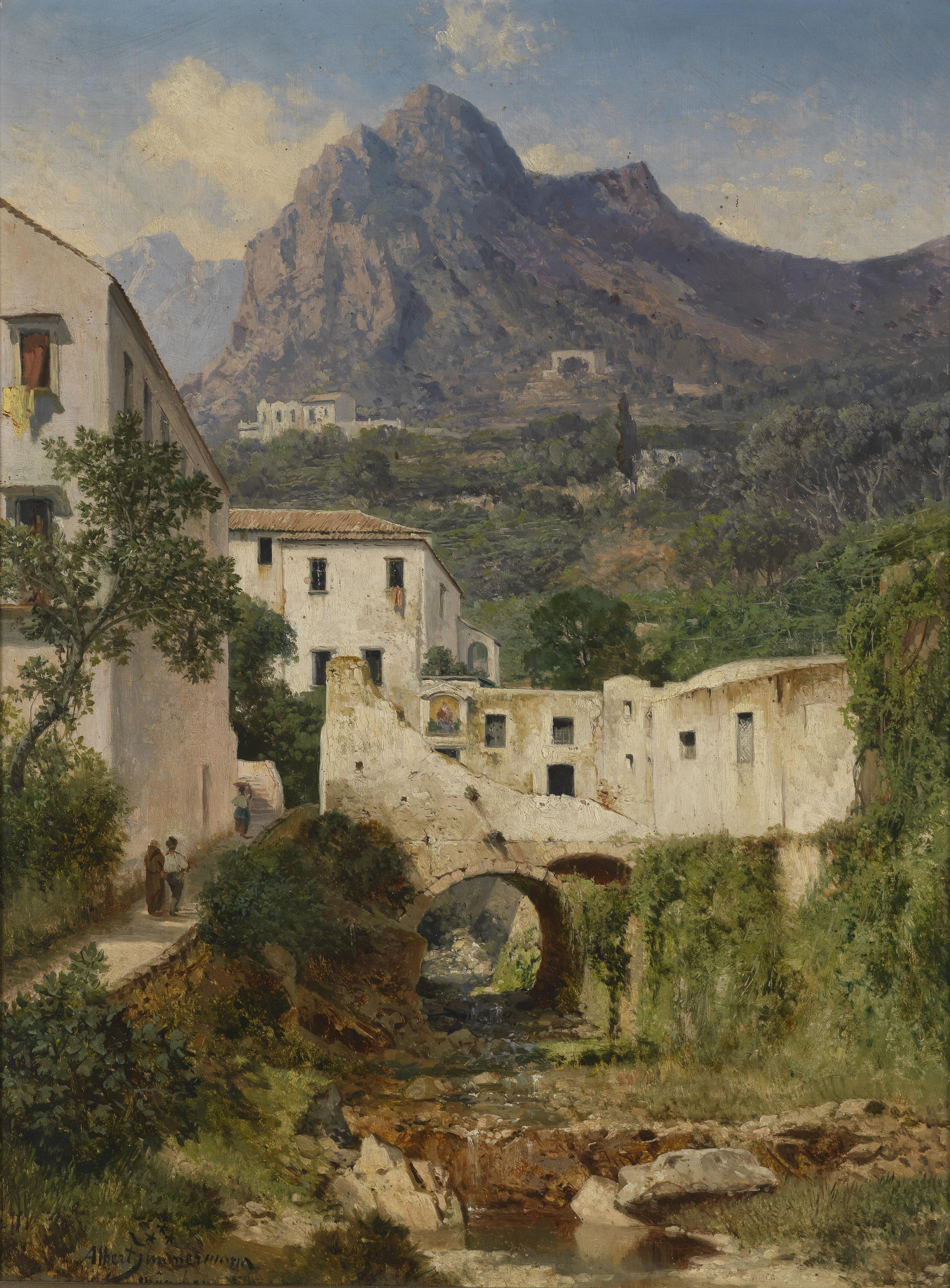 Mühltal bei Amalfi